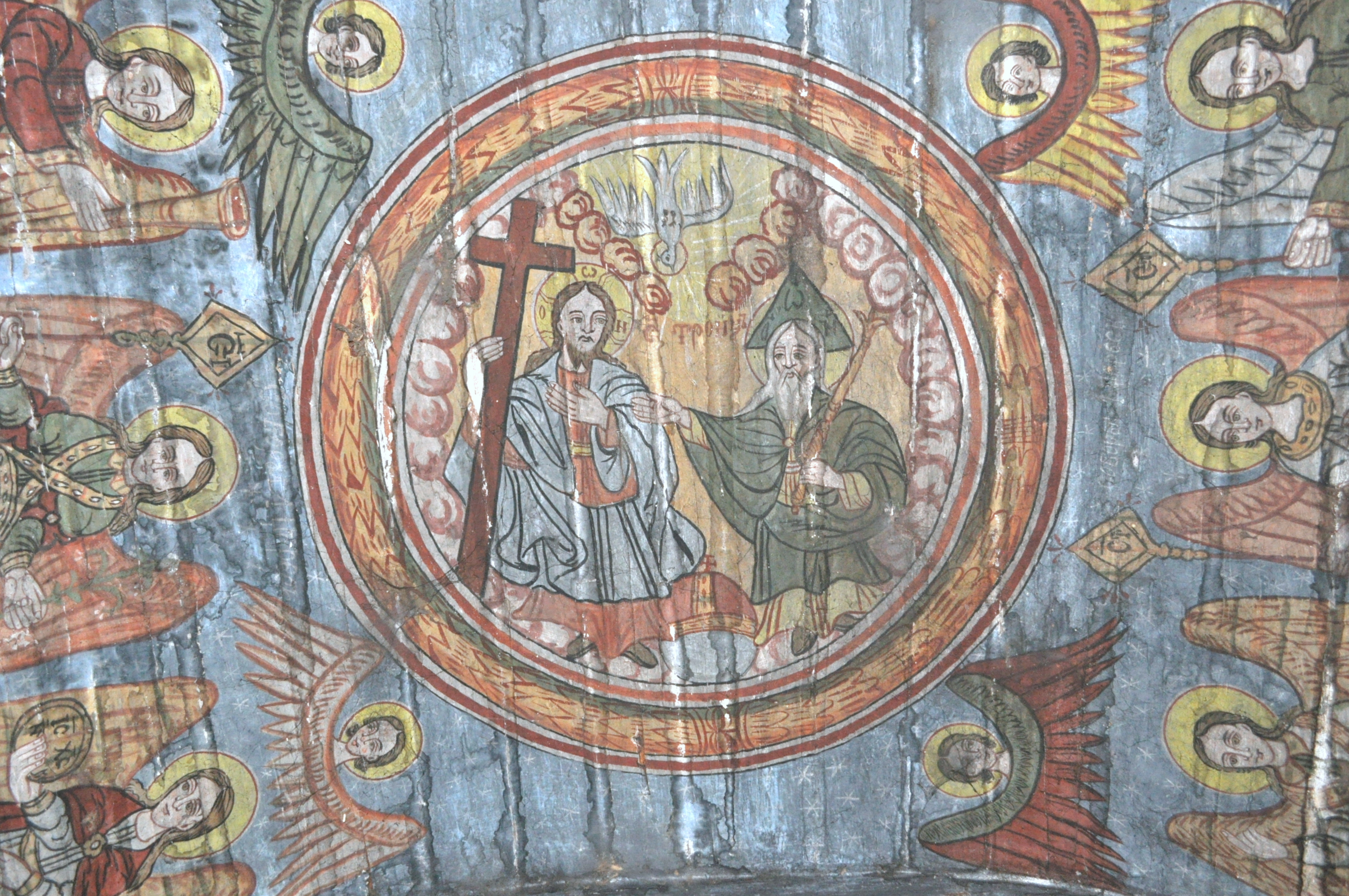 Biserica de lemn „Sfinții Arhangheli” din Runc, județul Alba